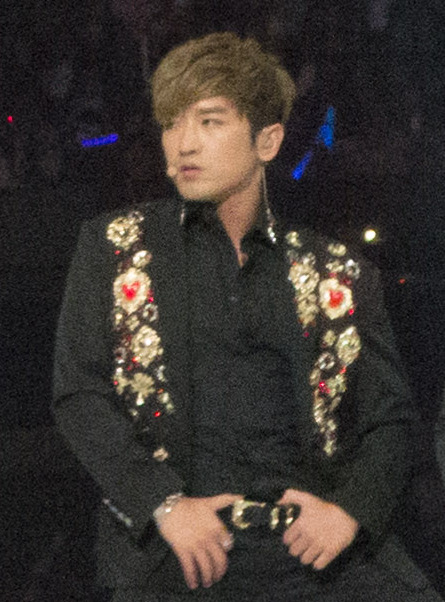 KCON 2015